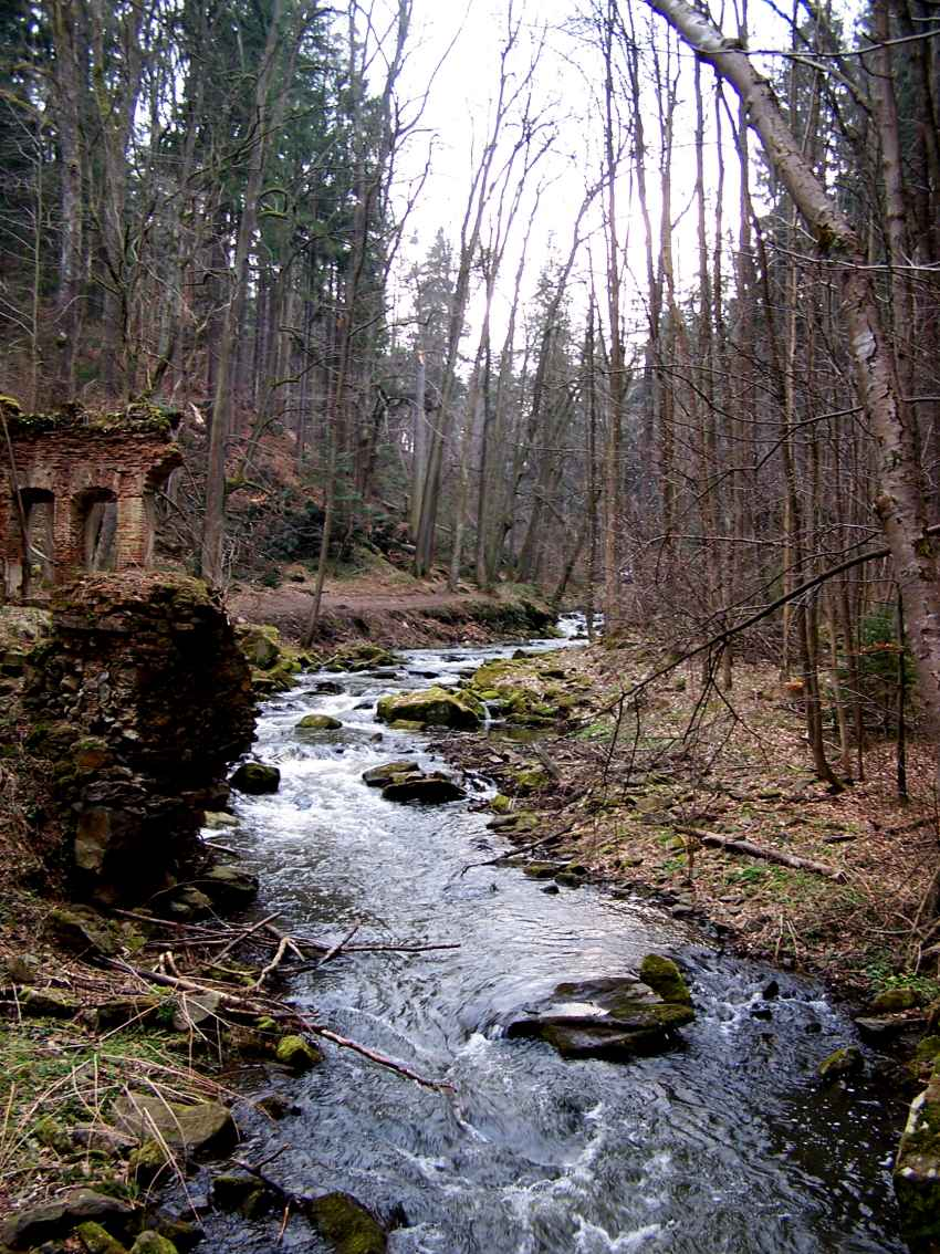 Říčka Stropnice v Tereziině údolí u Nových Hradů u zříceniny Modrého pavilonu